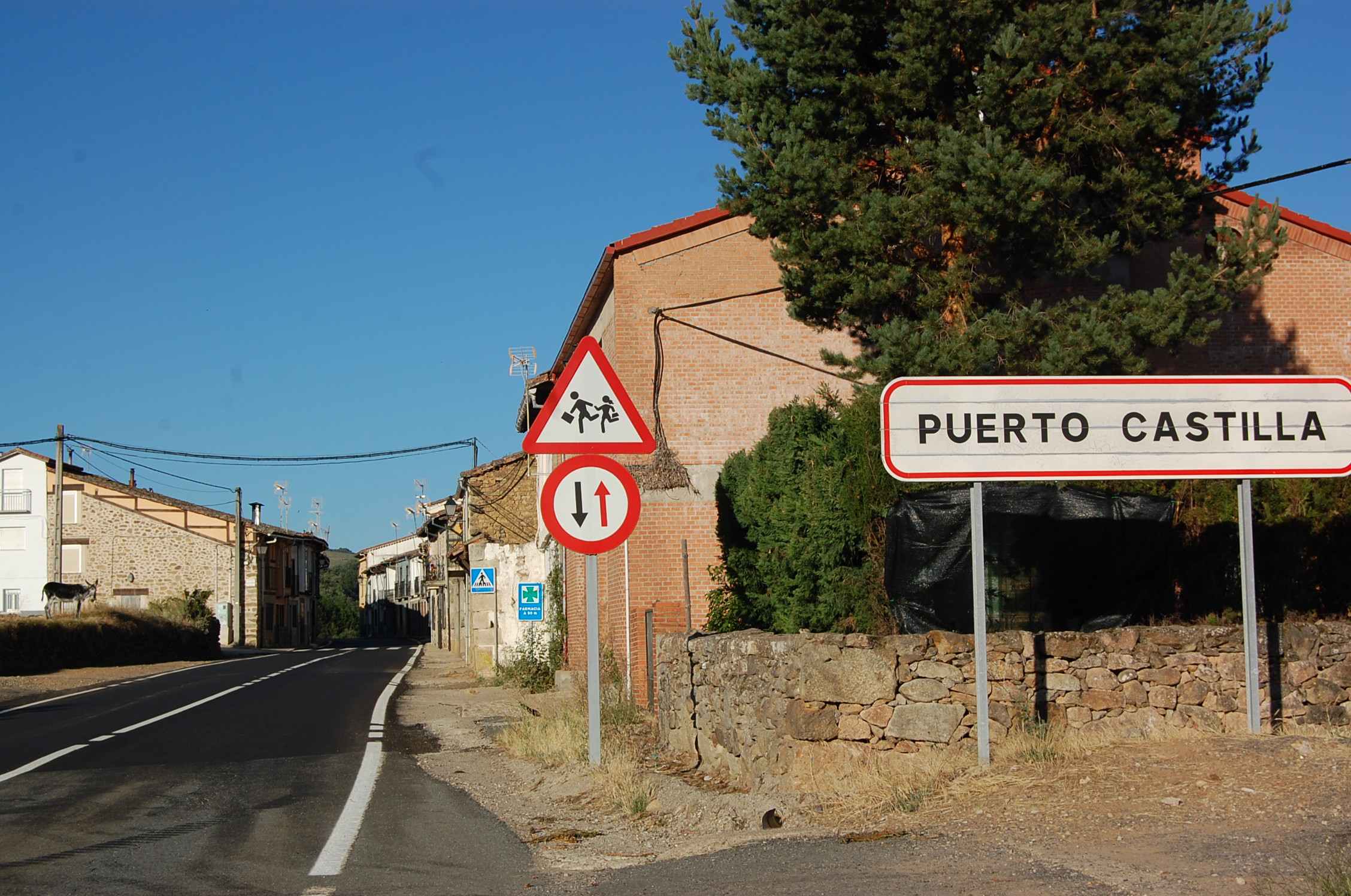 Walon: intrêye d' on viyaedje del Castile et Leyone, Espagne